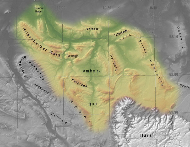 Topographische Karte vom Innerstebergland (nur Gelände)